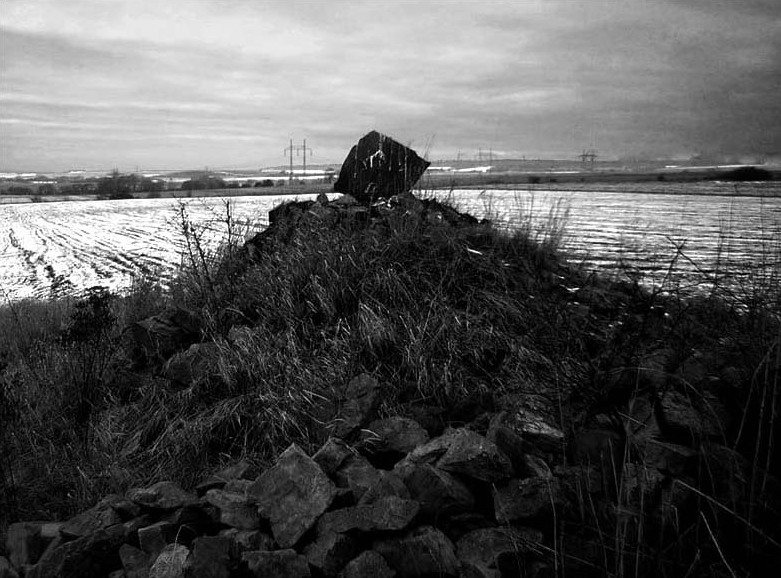 Zbořená barokní kaplička u Panošího Újezdu